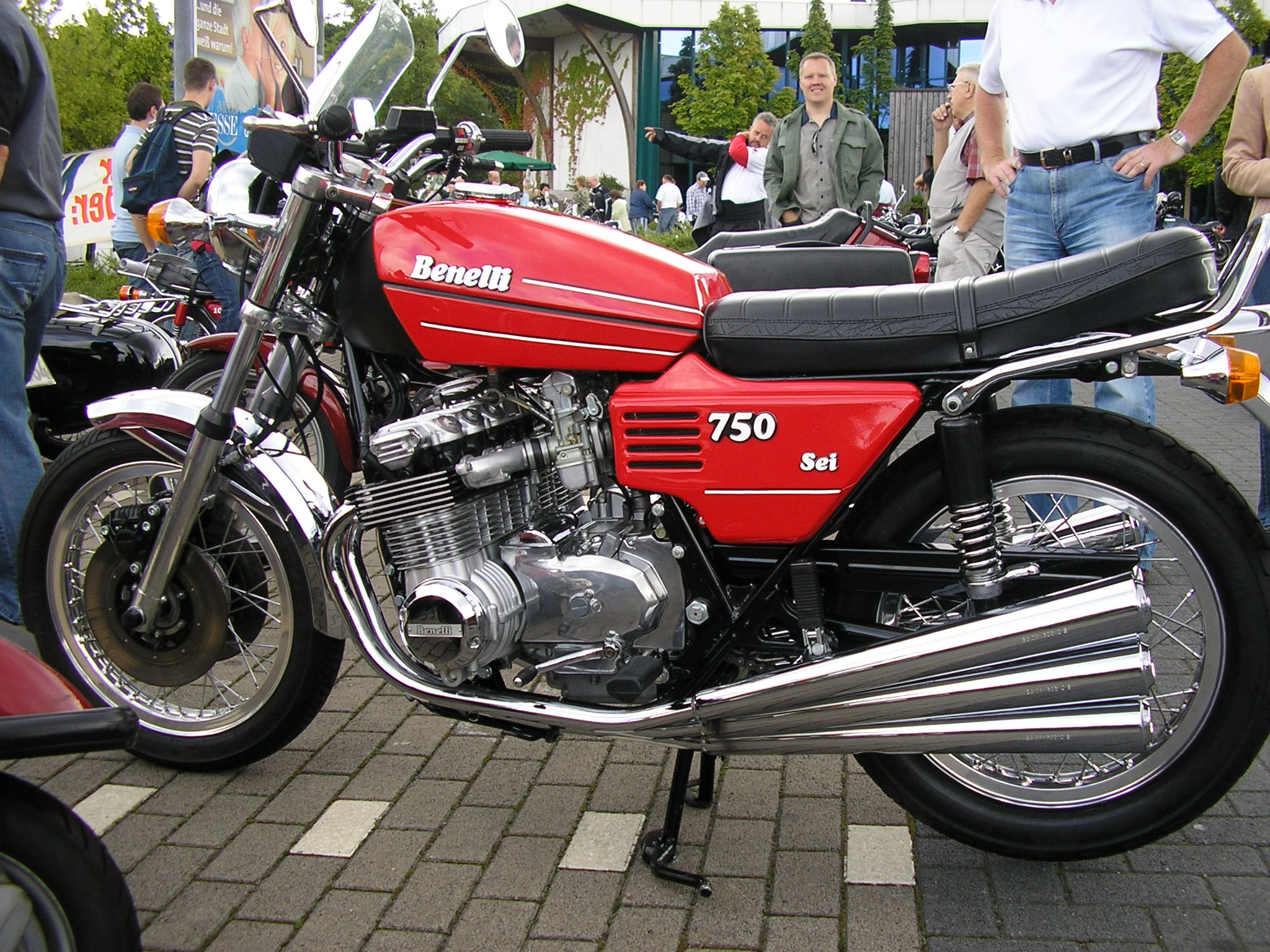 Benelli 750 Sei, Erstes Serienmotorrad mit Sechszylindermotor (1974)